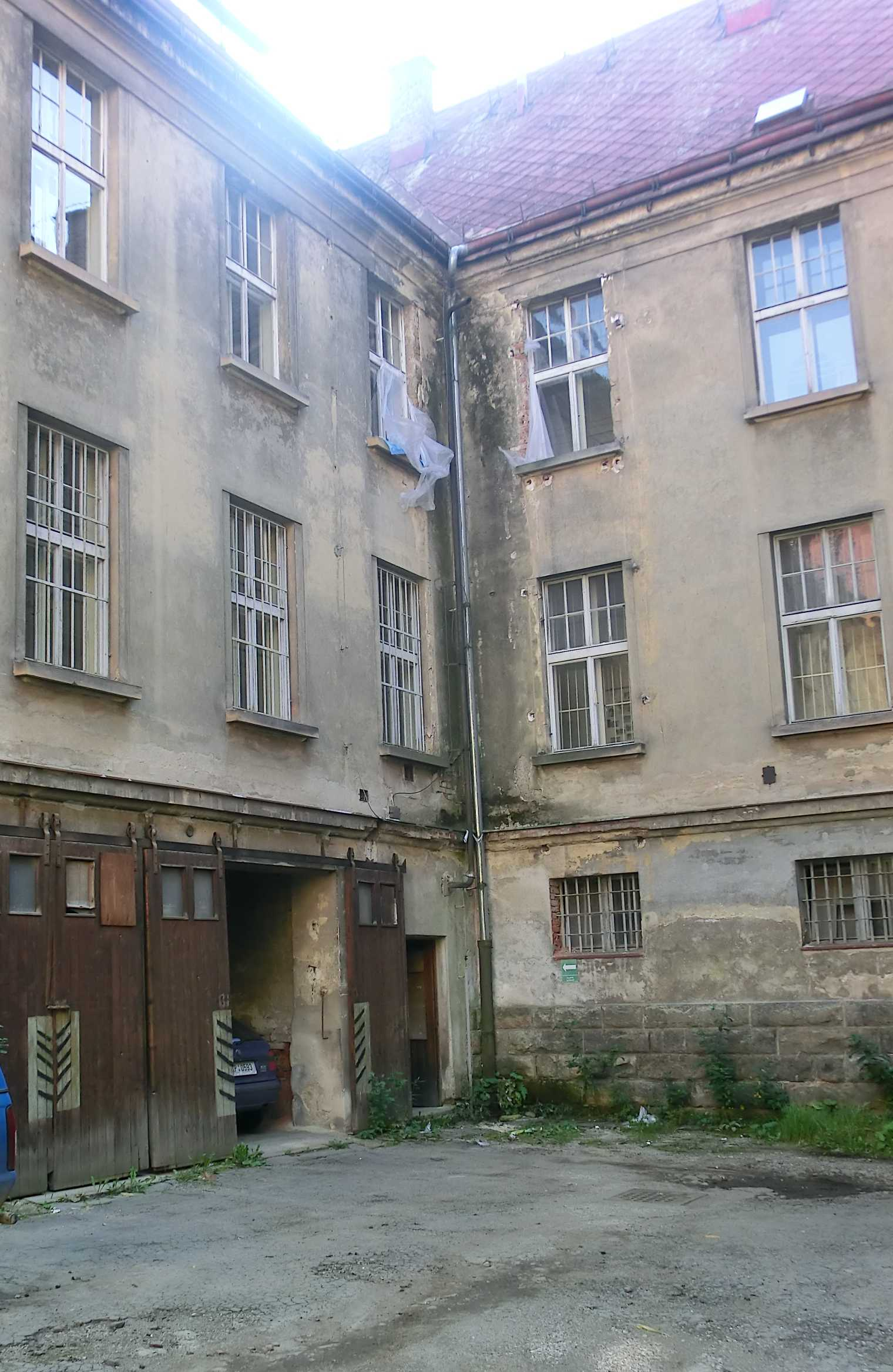 Budova pošty (bývalého Okresního soudu) v Jilemnici - rozpadající se vnitřní roh budovy nad bývalými garážemi četnictva a vchodem do vazební části věznice